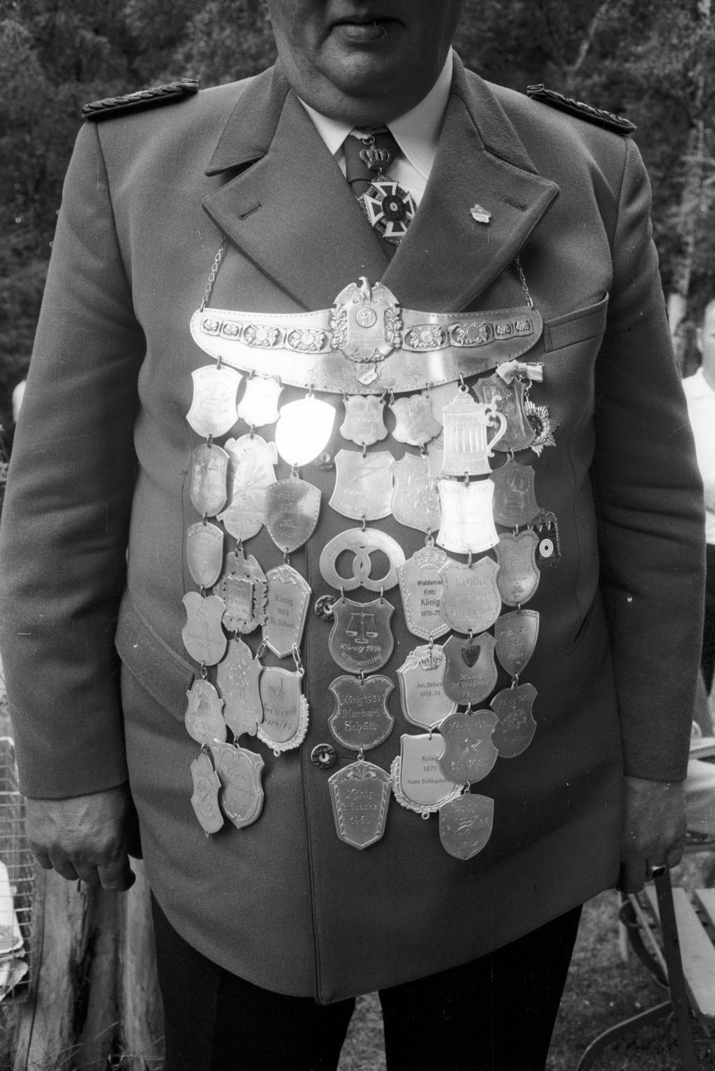 ist 48 Jahre alt und trägt die Namen und Berufe aller Schützenkönige seit 1928.